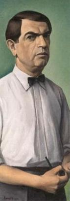 Selfportrait